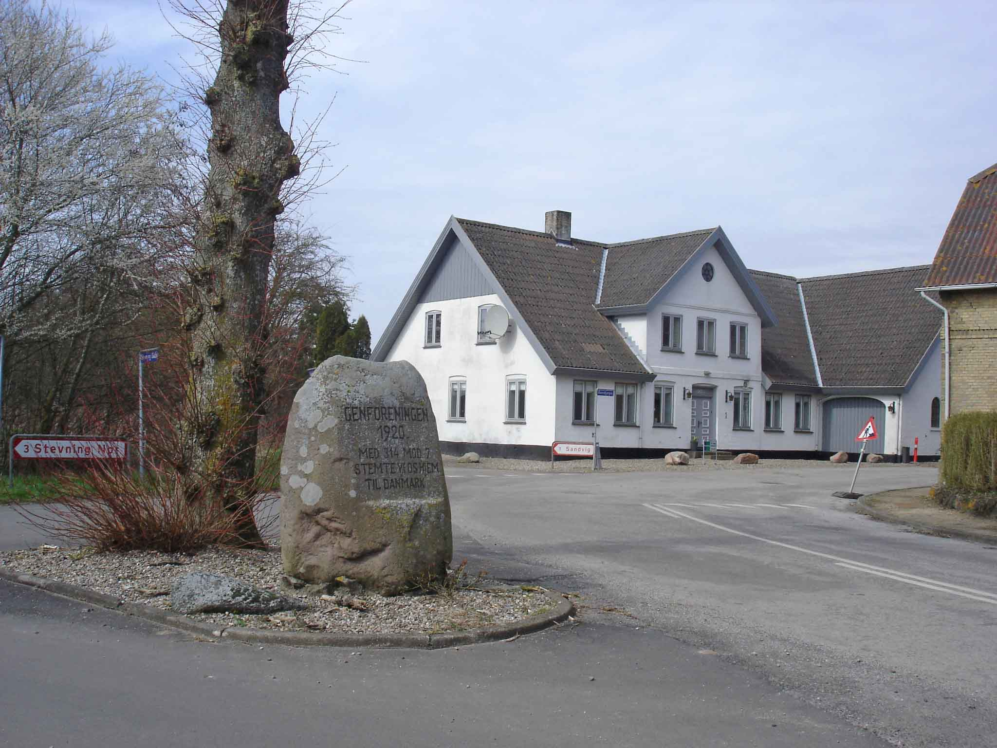 Genforeningssten i Stevning, som i 1920 stemte sig hjem til Danmark med 314 mod 7 stemmer. I baggrunden Hans Hansens kro og købmandsbutik, som blev drevet af slægten Martinsen helt fra 1800-tallet inden Hansen-familien tog over.